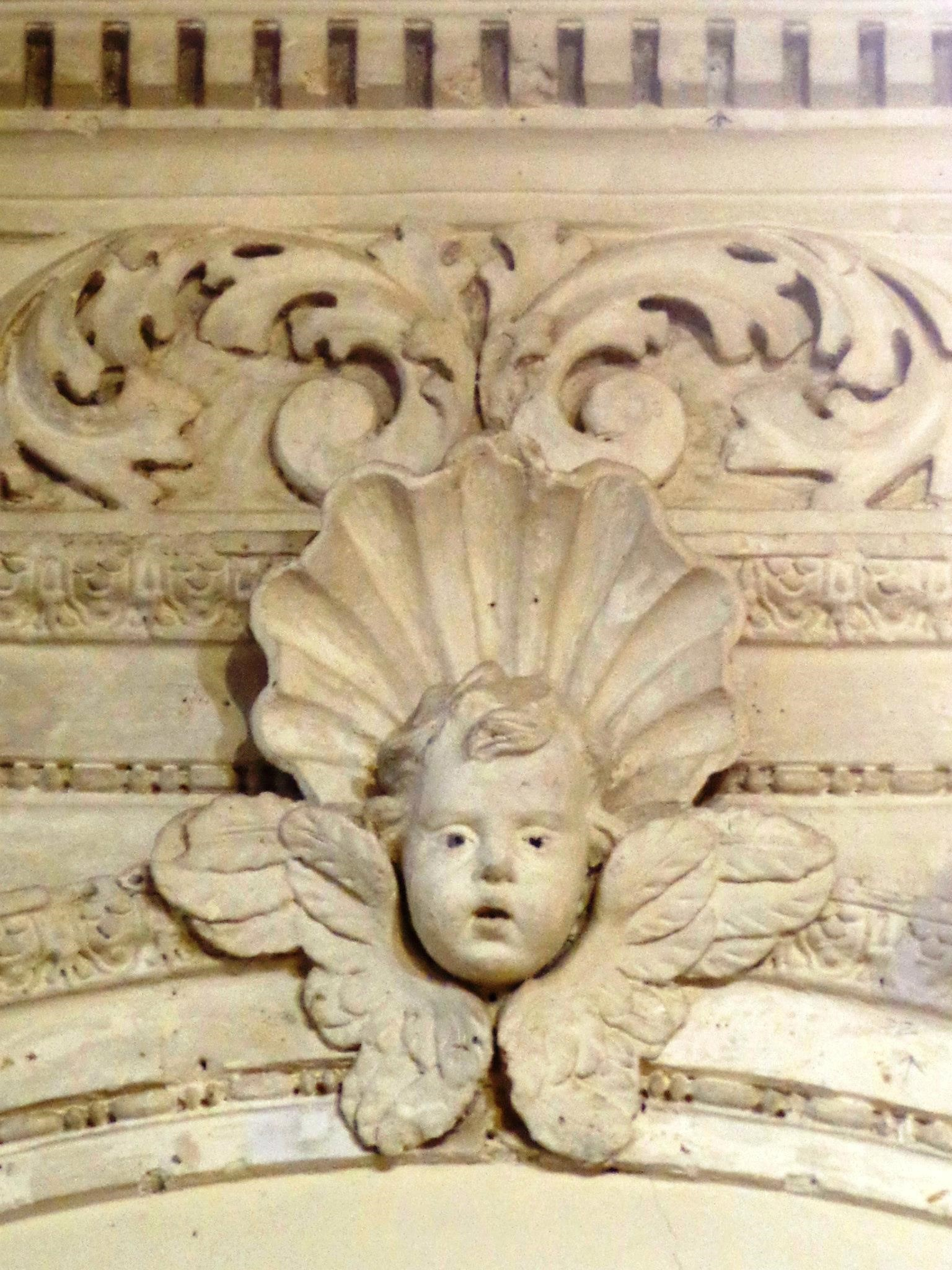 Apparato decorativo stucchi. Foto d'archivio. Immagine già presente su Facebook, Panoramio e altre pagine personali.